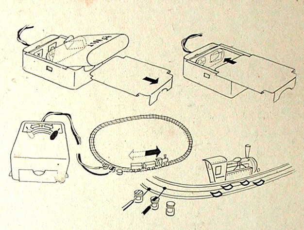 Trix Batteriebahn - Technik. Mit Hilfe einer 4,5 Block-Batterie, die man rückwärtig in einen kleinen Fahrpult einlegte, konnte die Batterielokomotive entsprechend angetrieben werden.